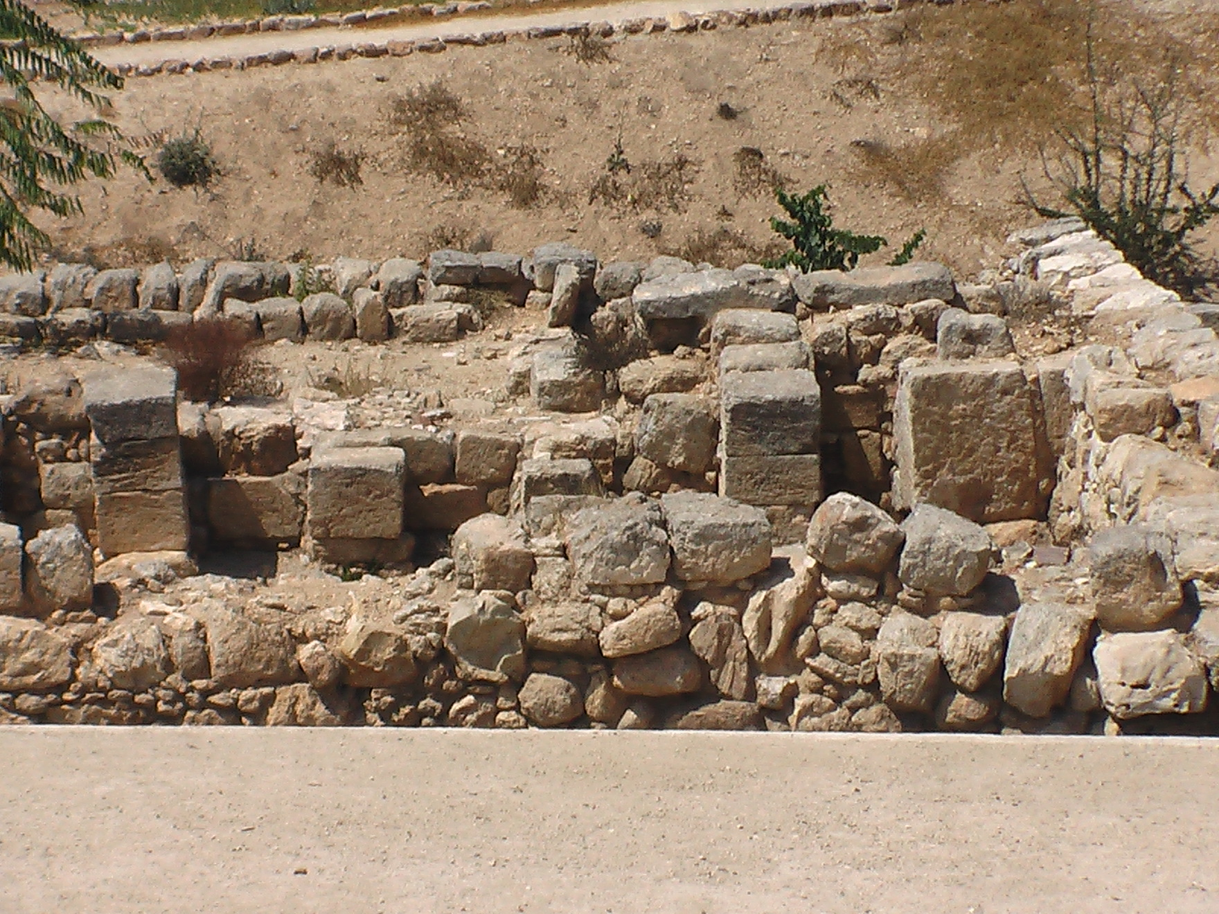 פארק ארכאולוגי ליד רמת רחל. צילם י.ש. 18:34, 17 יולי 2006 (IDT)